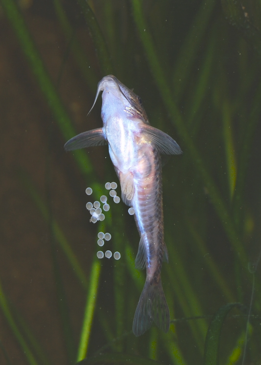 Hunne av Scleromystax barbatus som legger egg på glasset - a female Scleromystax barbatus laying eggs on the glass